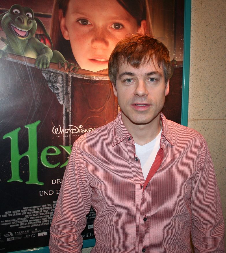 Comedian Michael Mittermeier bei der Vorstellung des Kinderfilms Hexe Lilli im Mannheimer Cineplex